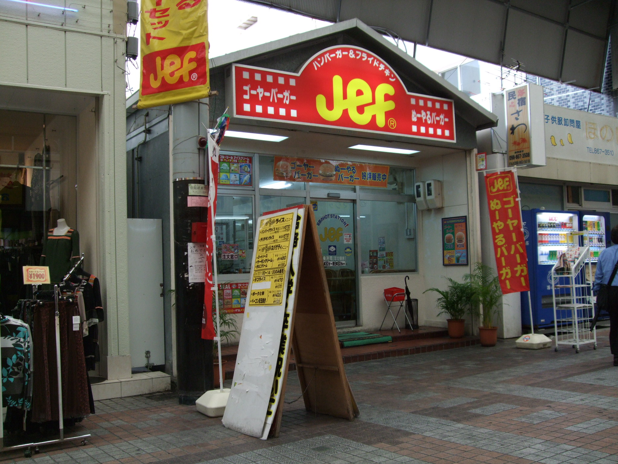 20080417_143000_DSCF3754